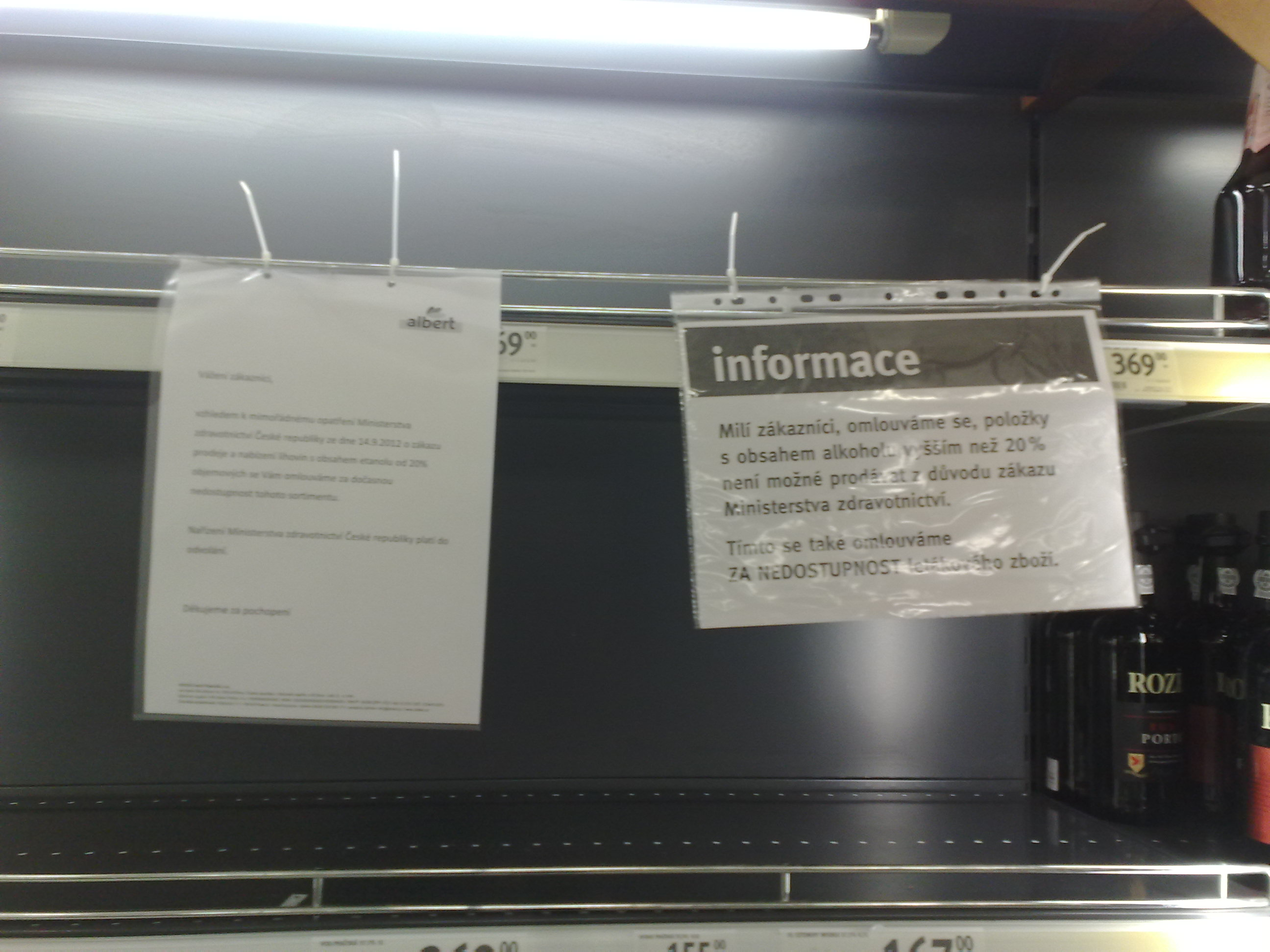 Prohibice v ČR - prázdné regály.